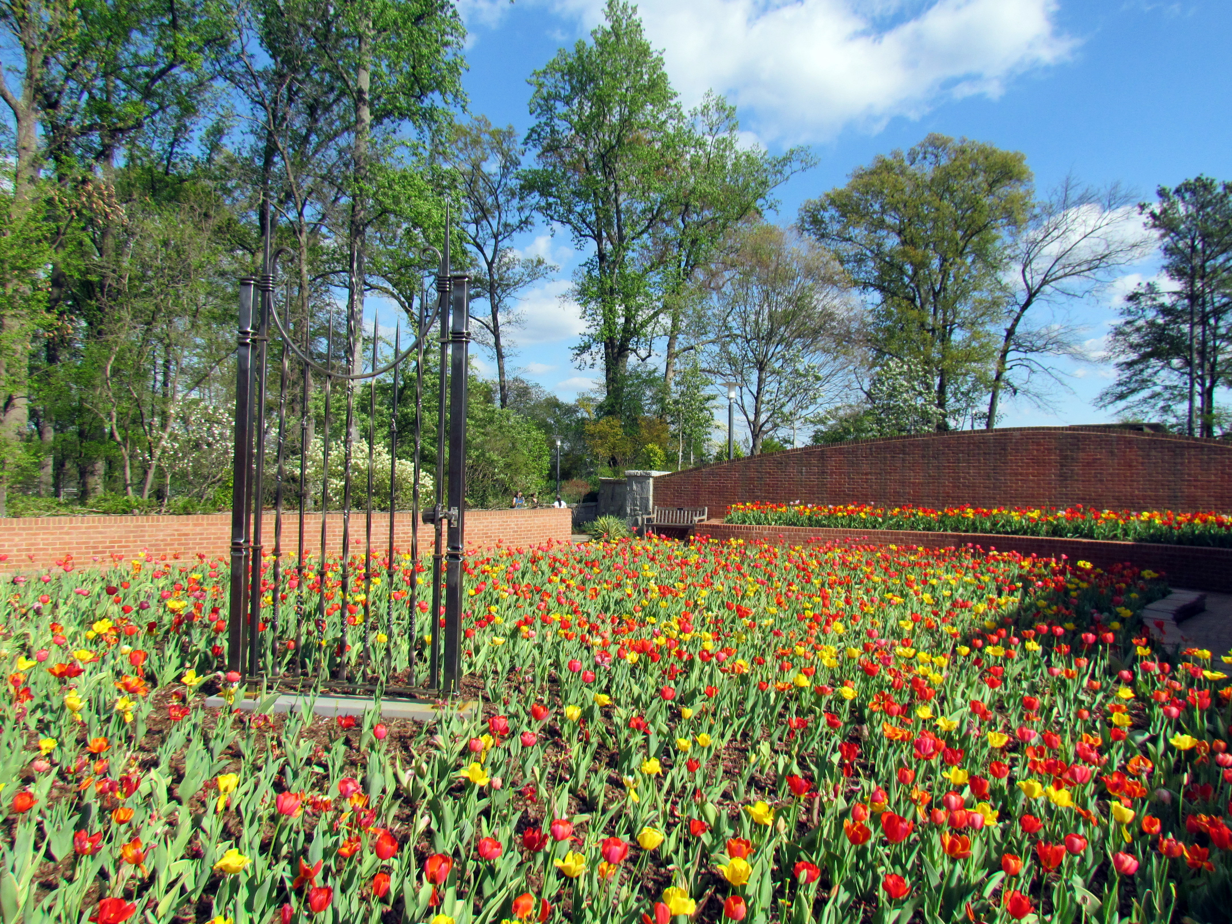 Atlanta Botanical Garden